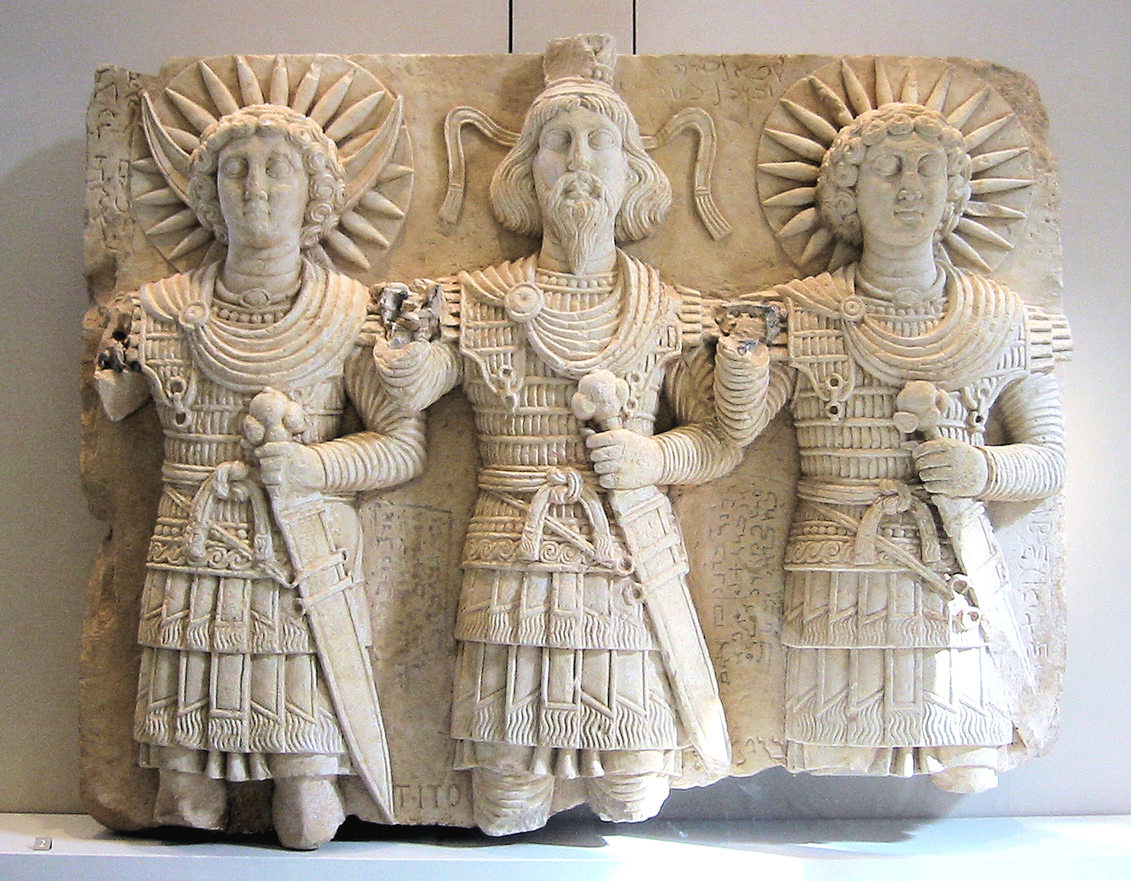 Palmyrene deities. Louvre Museum. Personal photograph 2006.